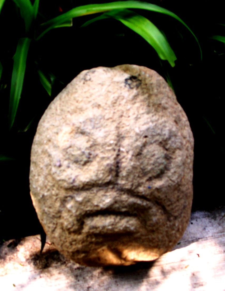 Dios de la lluvia. Pieza prehispánica. San Juan Achiutla, Oaxaca, México.